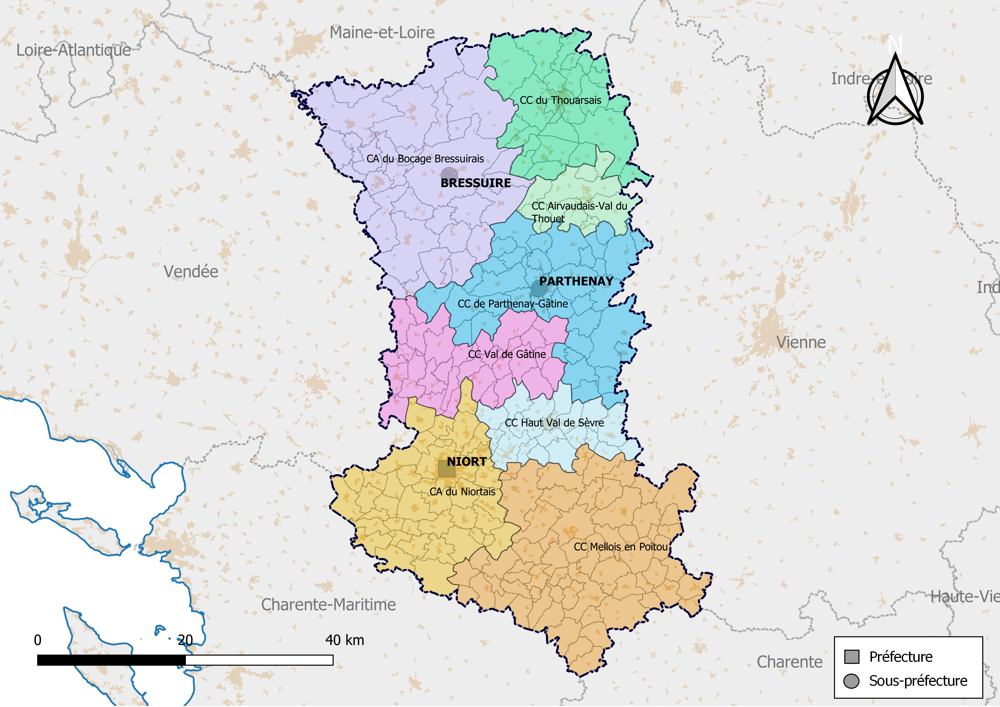 Carte des intercommunalités du département des Deux-Sèvres, France. Composition au 1er janvier 2019.